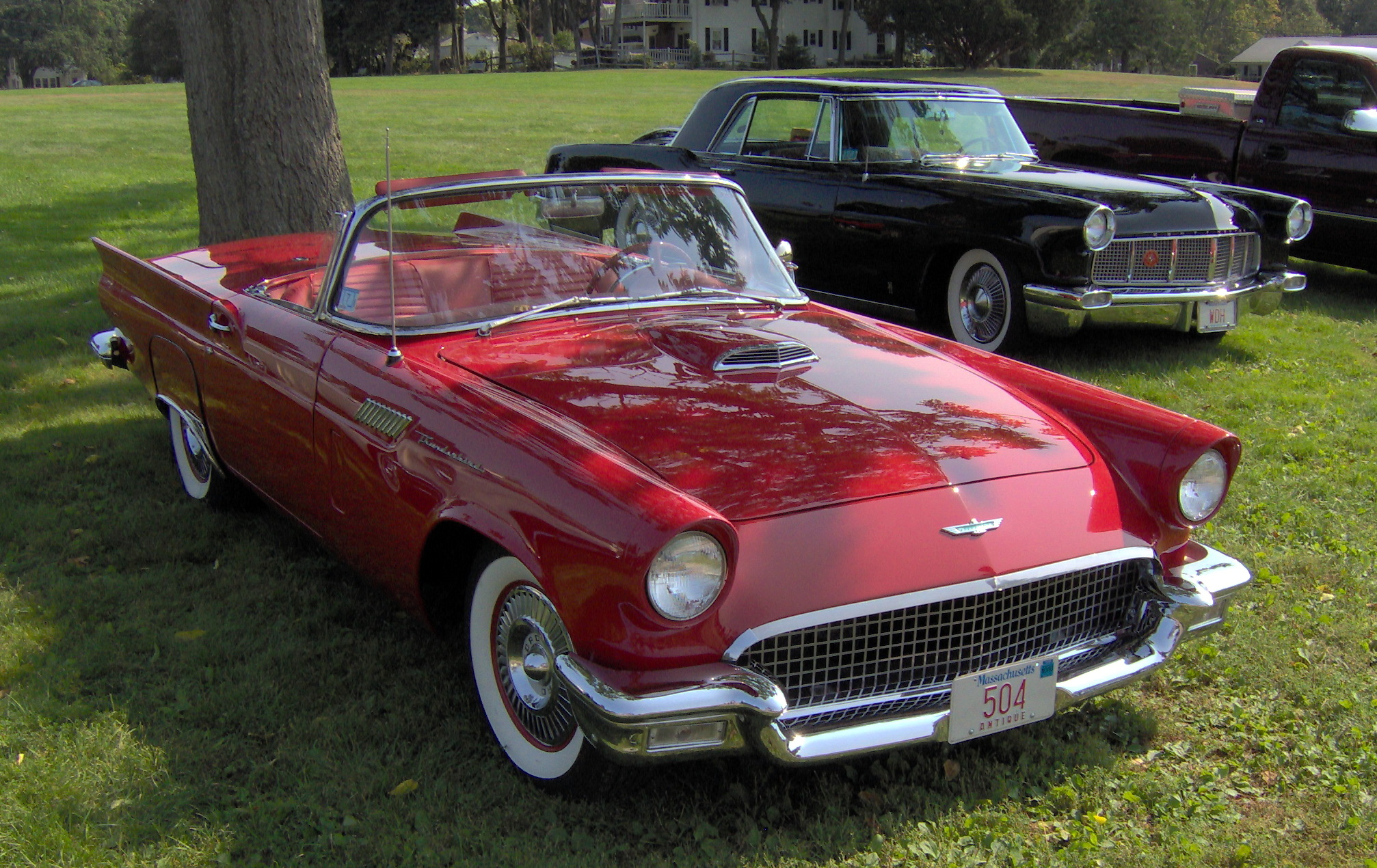 1957 Ford Thunderbird